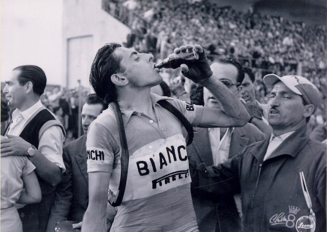 Fausto Coppi all'arrivo della 9 tappa della 34 edizione del Giro d'italia (AS Foggia, Gaetano Spirito, vol. XIII, fasc. 18/2, 1951)